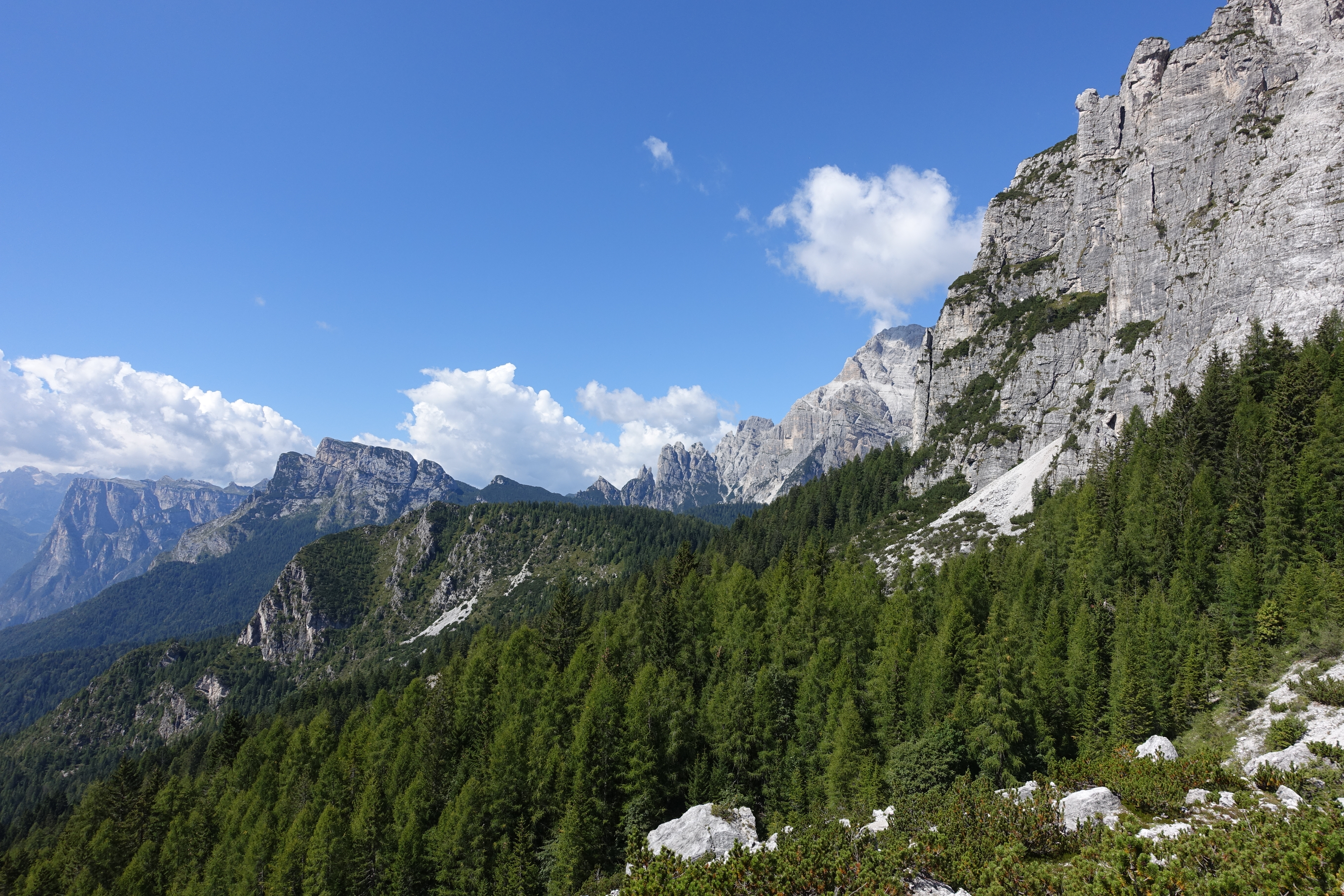 32020 La Valle Agordina, Province of Belluno, Italy